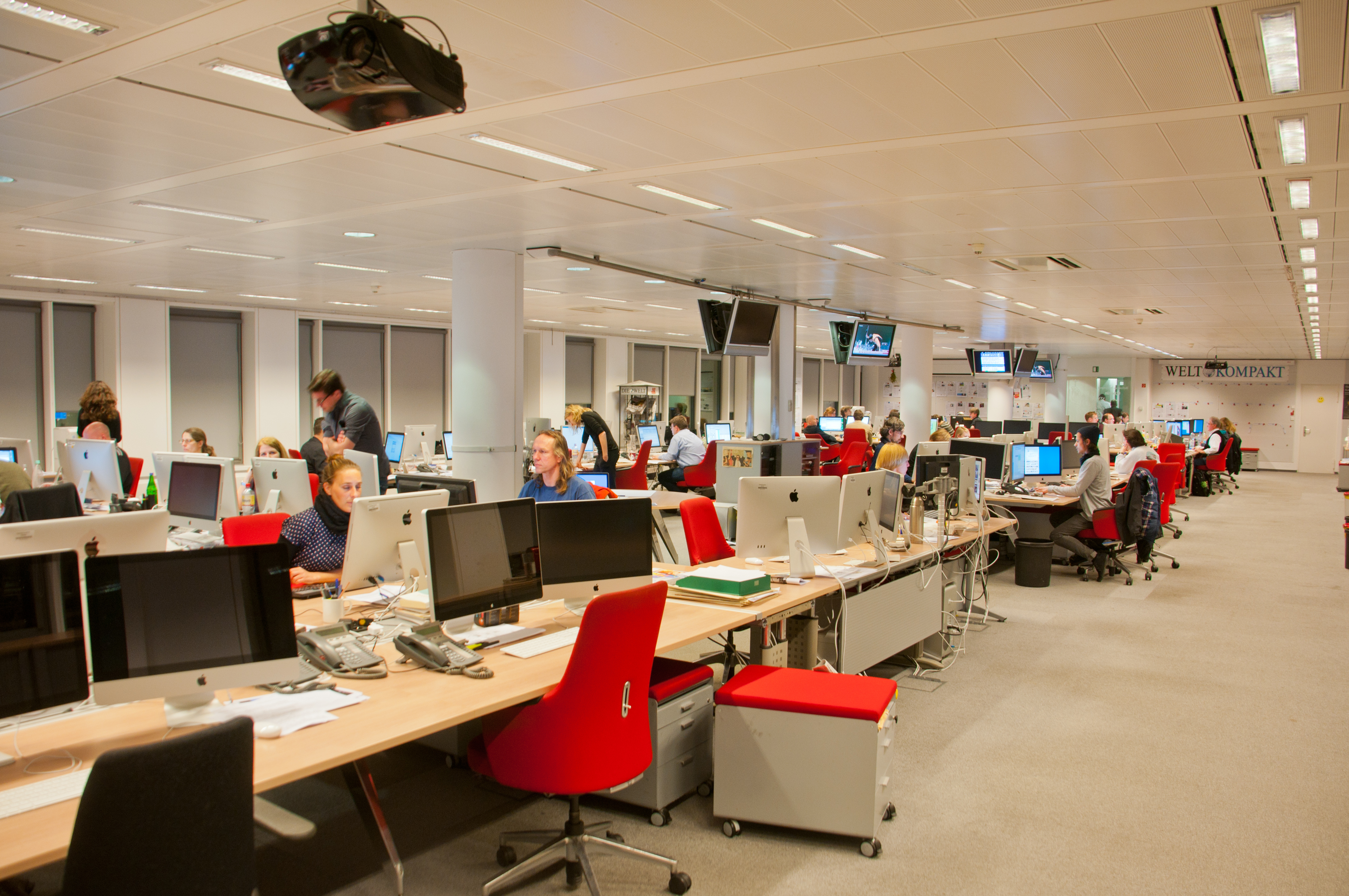 Wikipedia Stammtisch Berlin zu Besuch im Springer- Hochhaus